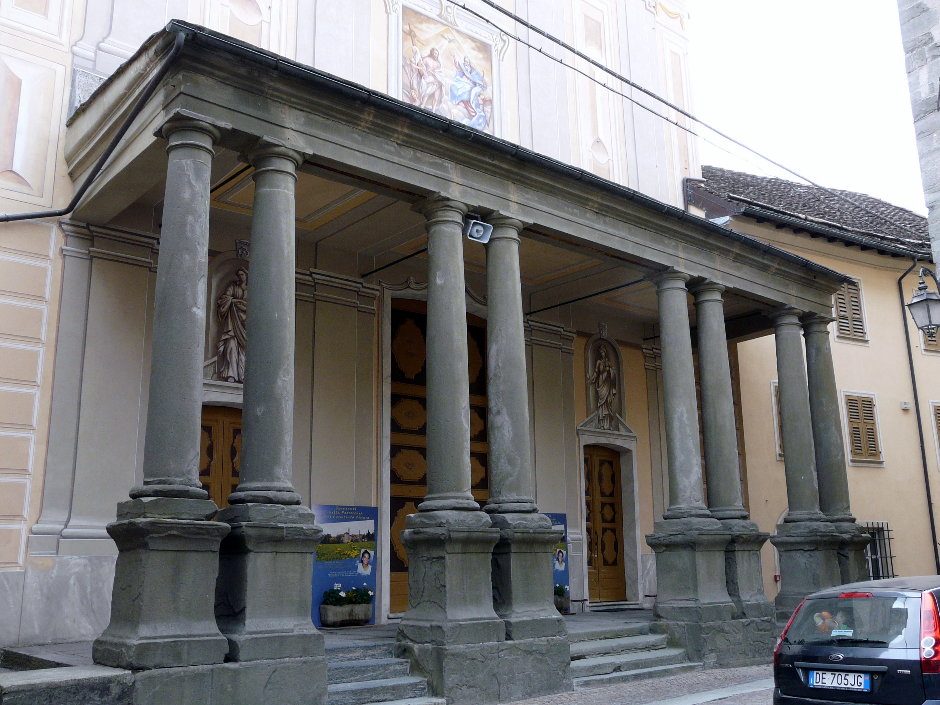 Particolare del colonnato della chiesa della Santissima Trinità, Sassello, Liguria, Italia